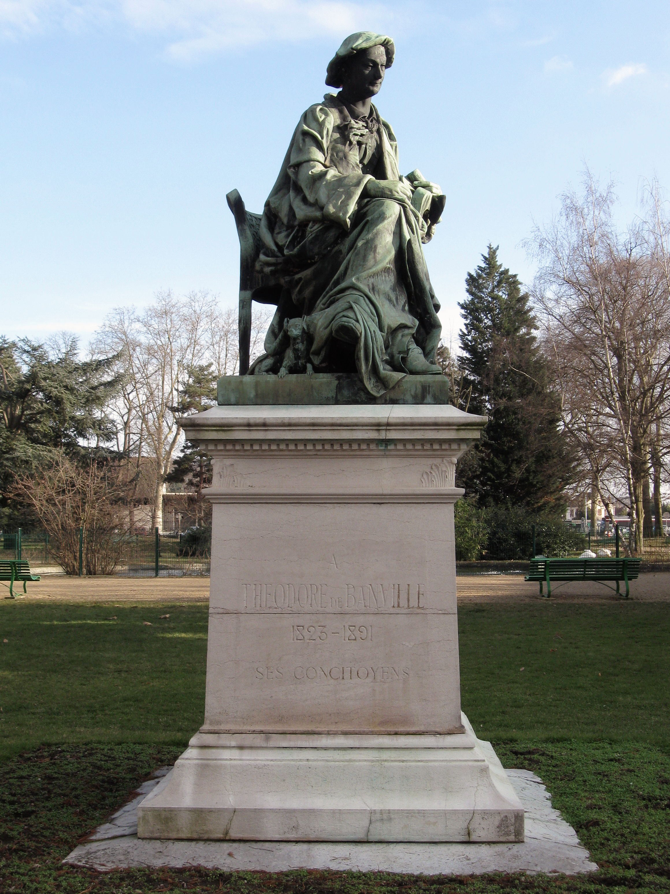 Statue de Théodore de Banville, Moulins, Allier, France Sculpteur : Jean Coulon (1853-1923)